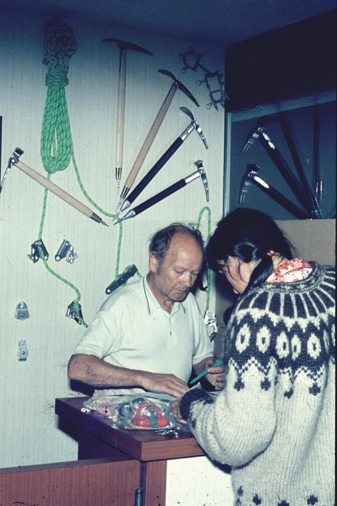 Fernand Petzl -diapo-aout-1979.jpg